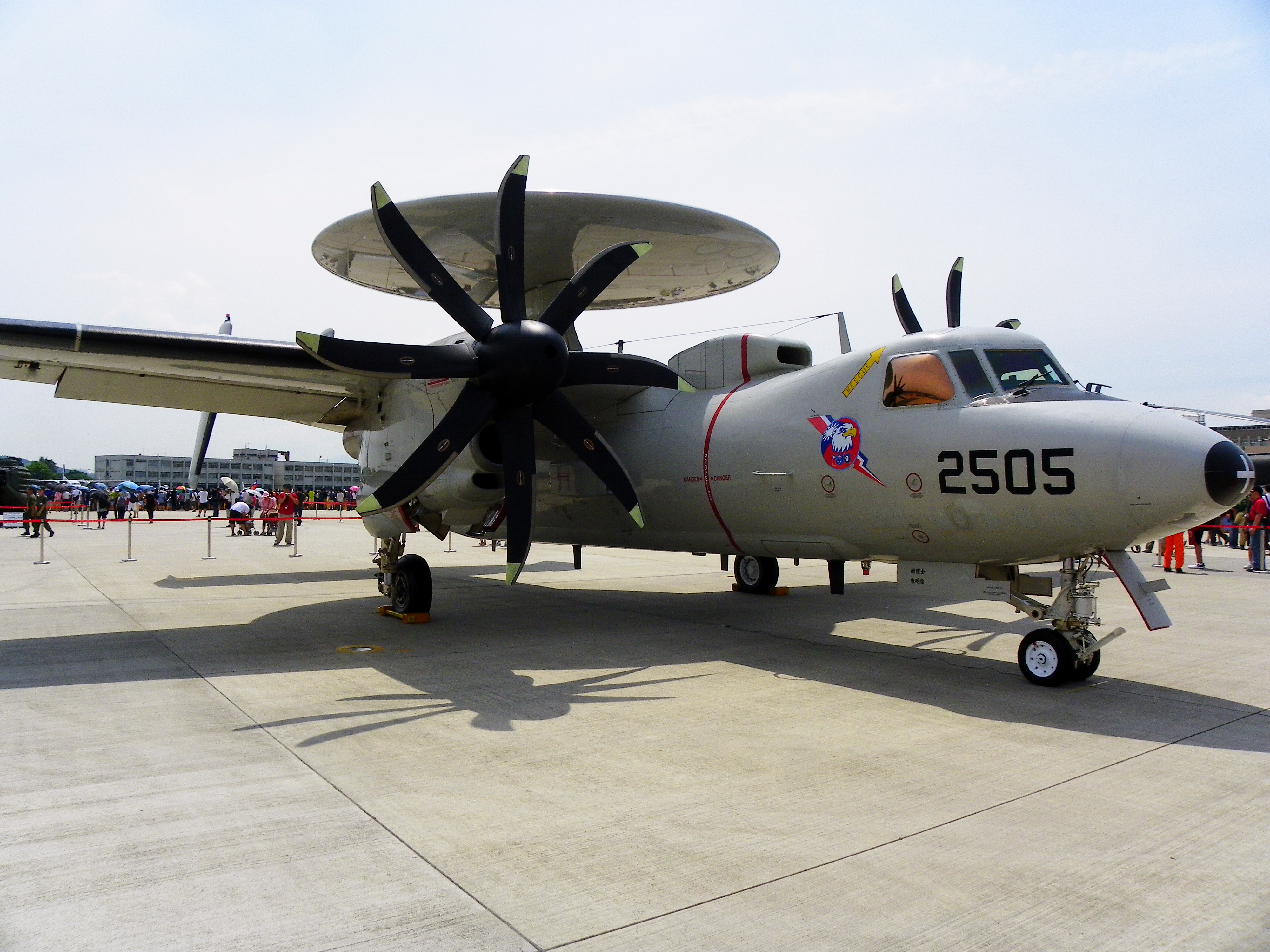 E-2K早期預警機前部，攝於2011年8月13日空軍松山基地營區開放活動。